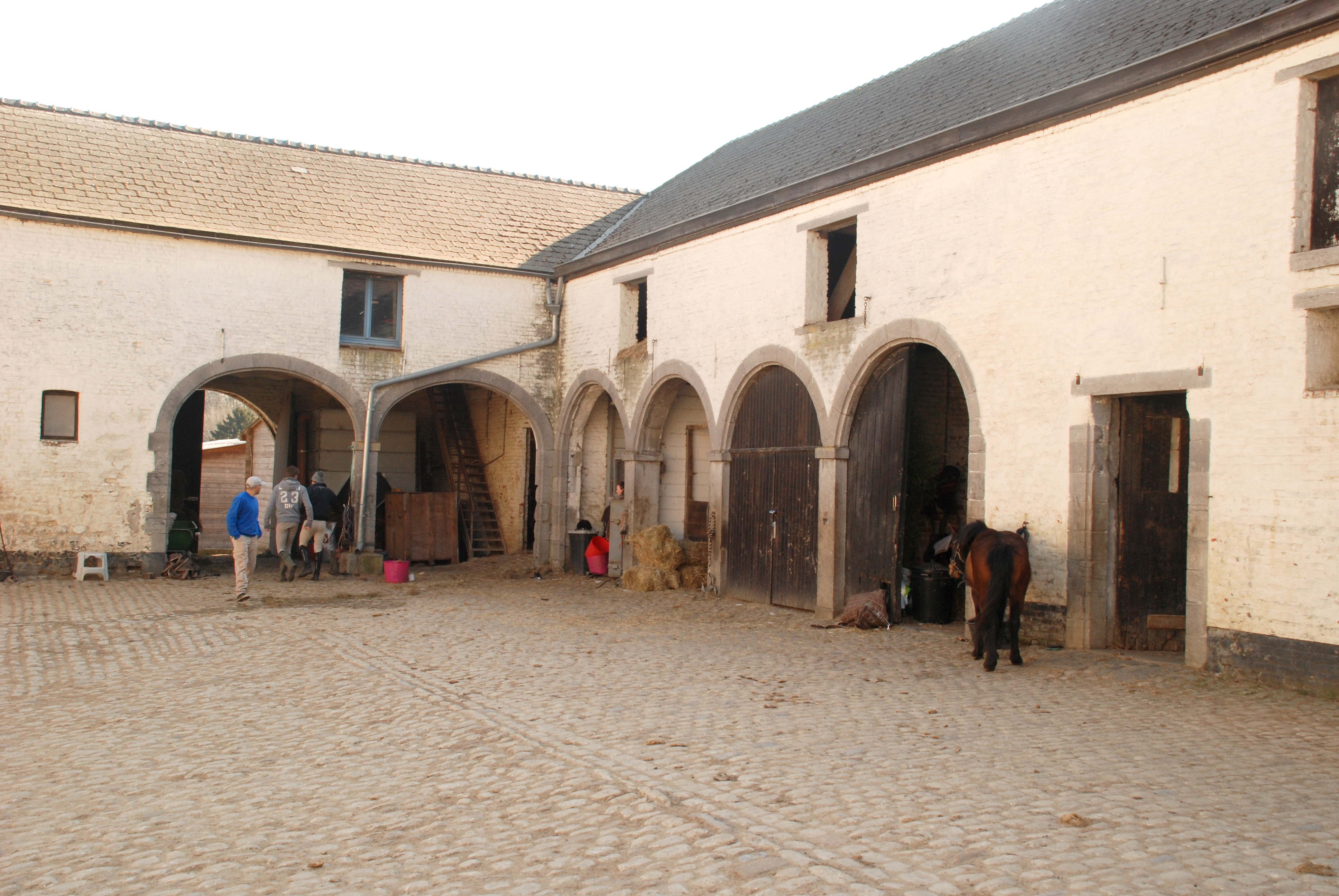 Belgique - Brabant wallon - Site de la bataille de Waterloo - Ferme de la Papelotte